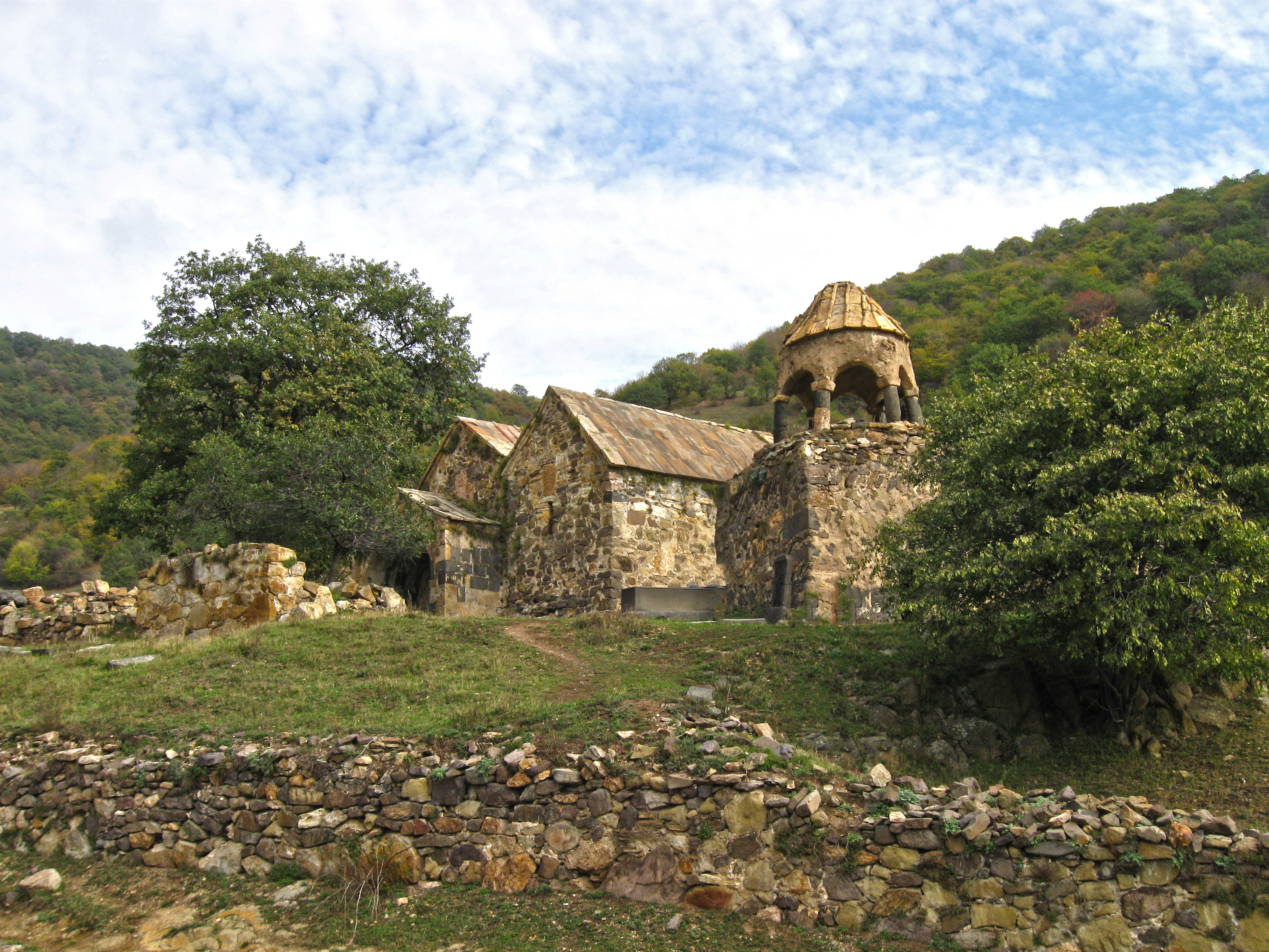 Վանական համալիր Սբ. Հովհաննես (Սրբանես, Հովհան Օձնեցու վանք) 17/10